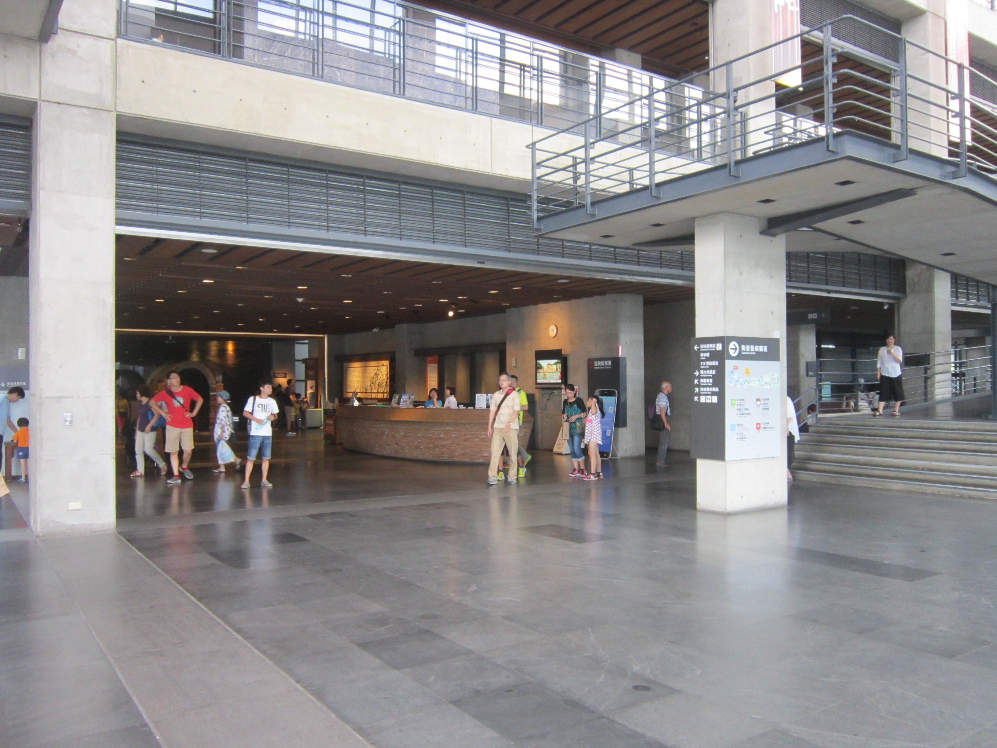 新北市立鶯歌陶瓷博物館諮詢服務台。